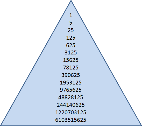 Illustrasjon av hvordan et pyramidespill med 5 vervede i hvert ledd vil kollapse innen 14 ledd.